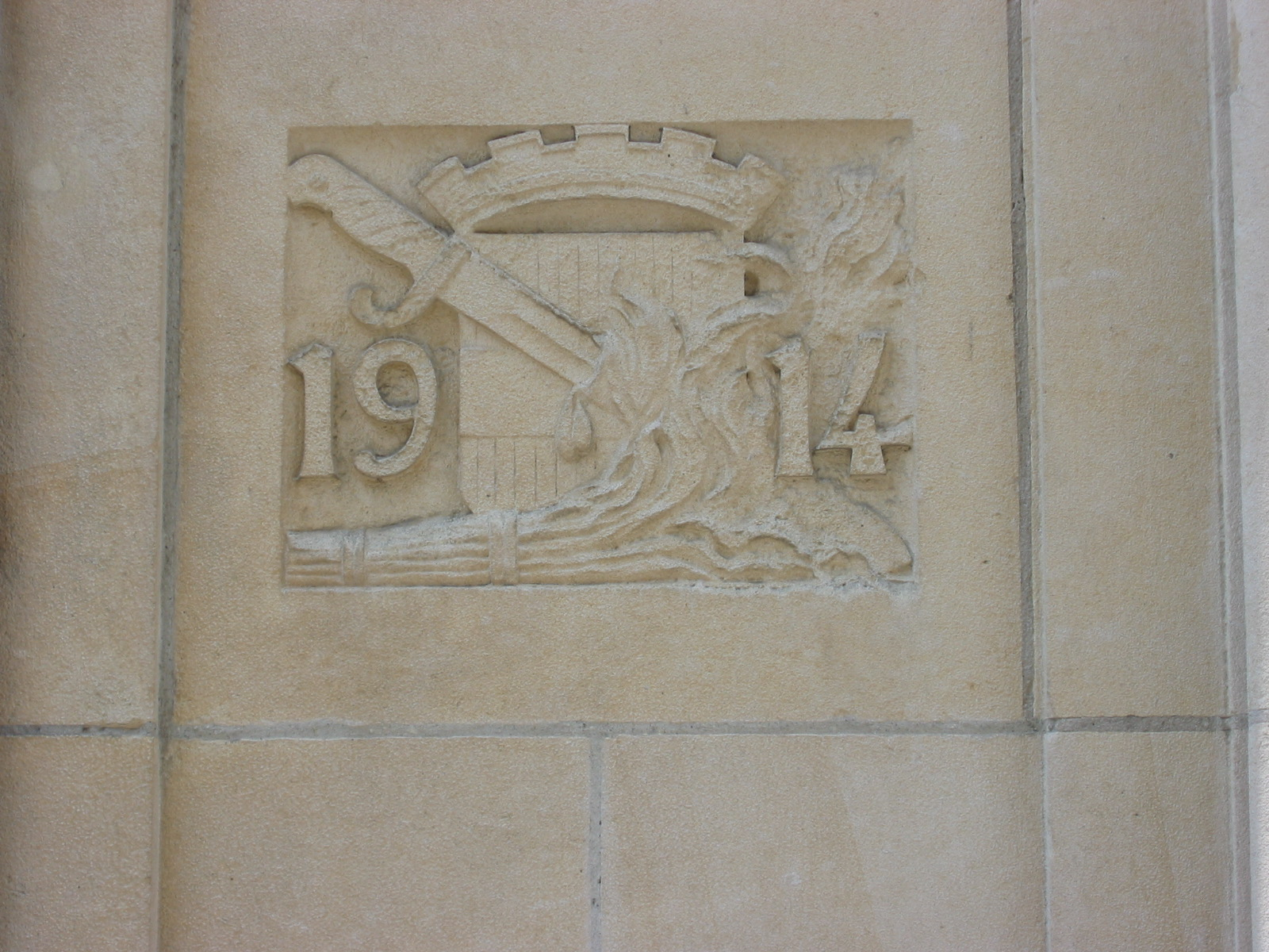 Deze steen werd gegeven aan alle Leuvenaars die hun huis herbouwden na WOI. Deze is geplaatst in een gevel op de Oude Markt. (Gemaakt in juni 2006)